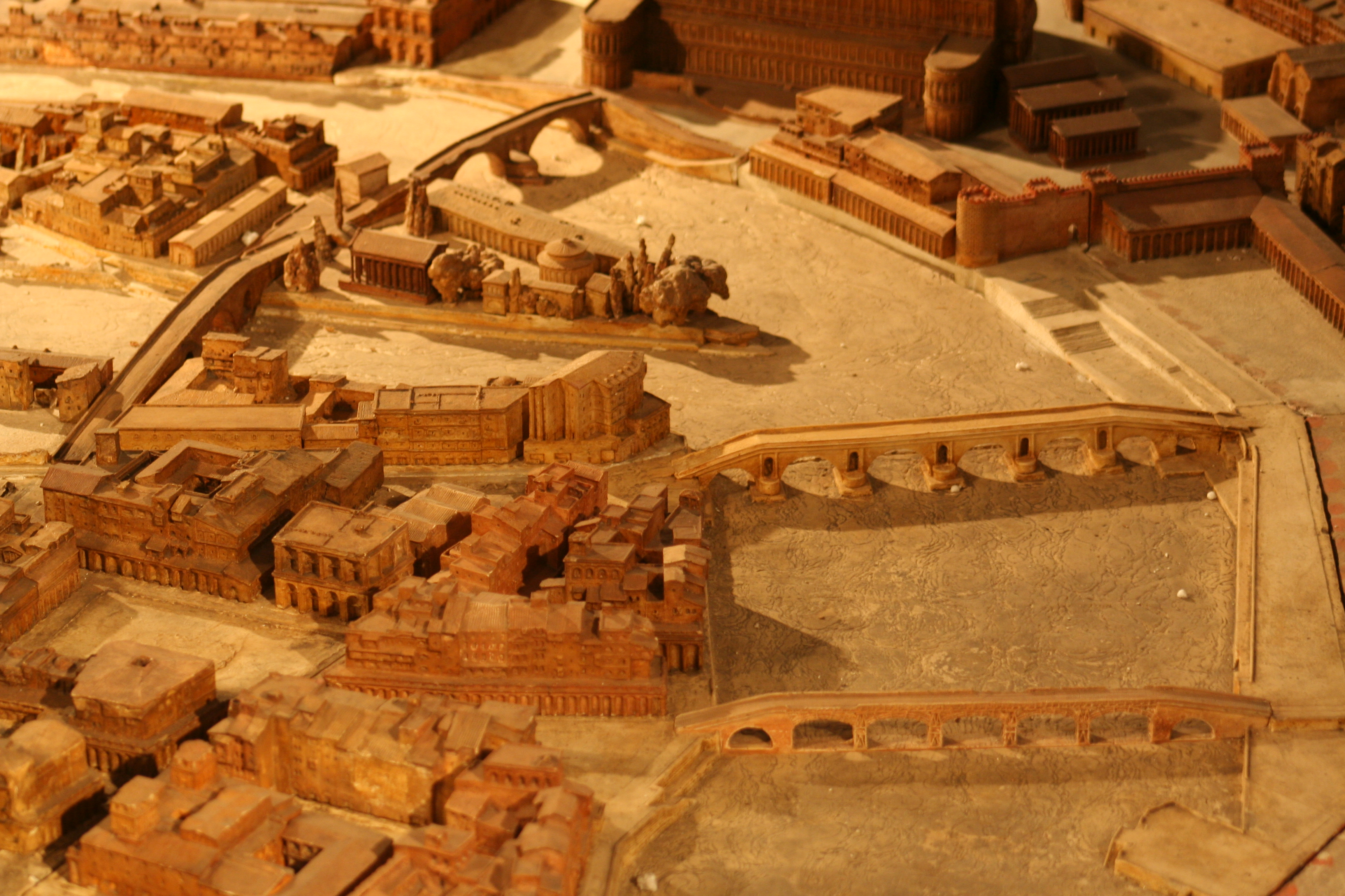 Ponts de Rome (de droite à gauche : Sublicius, Aemilius, Fabricius et Cestius) et pointe Tibérine, plan de Rome Paul Bigot, MRSH université de Caen